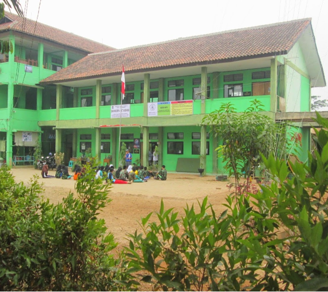 lapangan